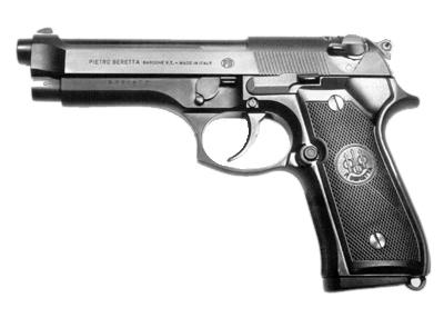 Italiano Beretta 92FS. Foto proveniente dal sito Sito Ufficiale dell'Esercito Italiano, Autorizzazione.